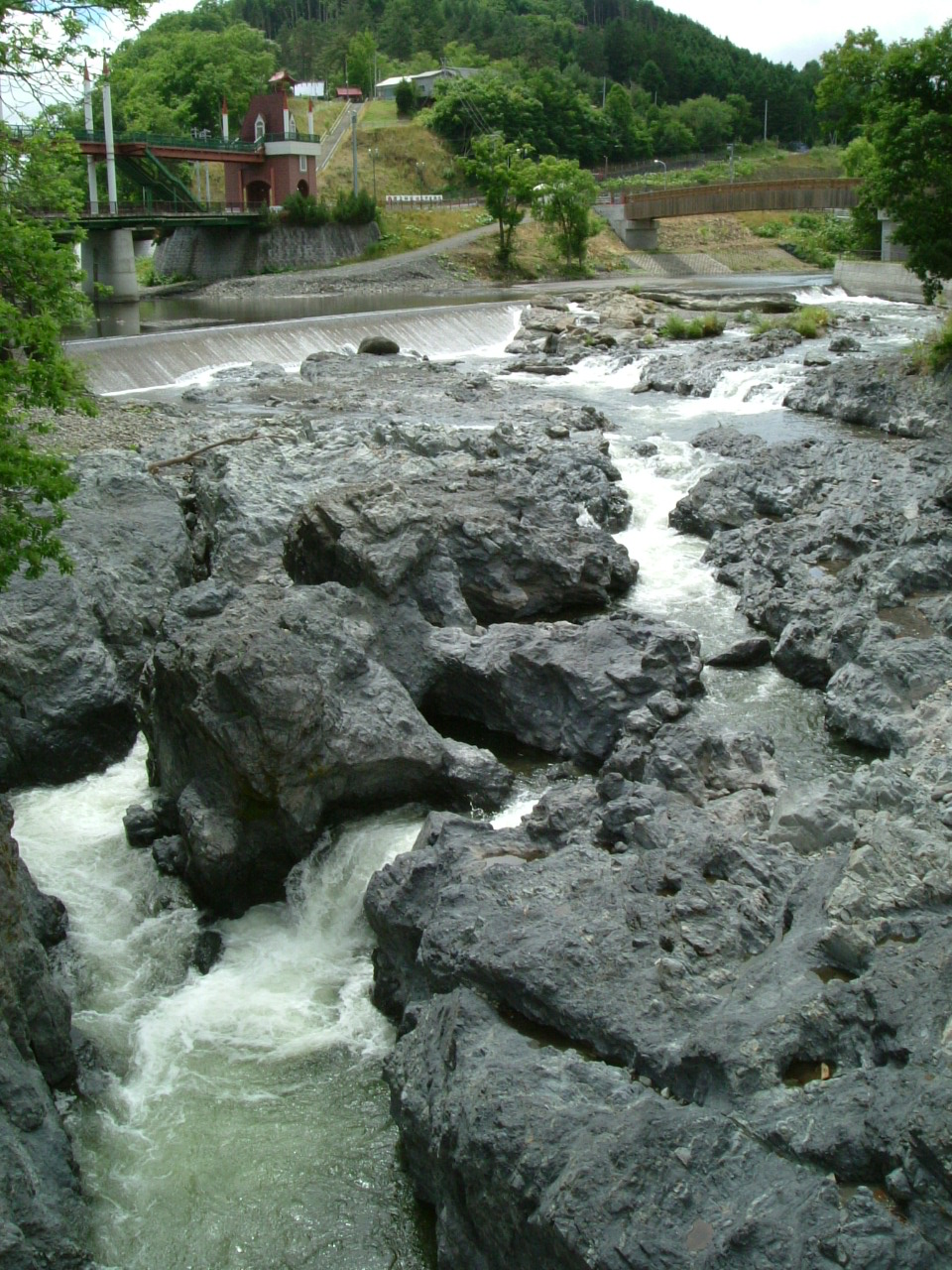 北海道滝上町蛟竜の滝